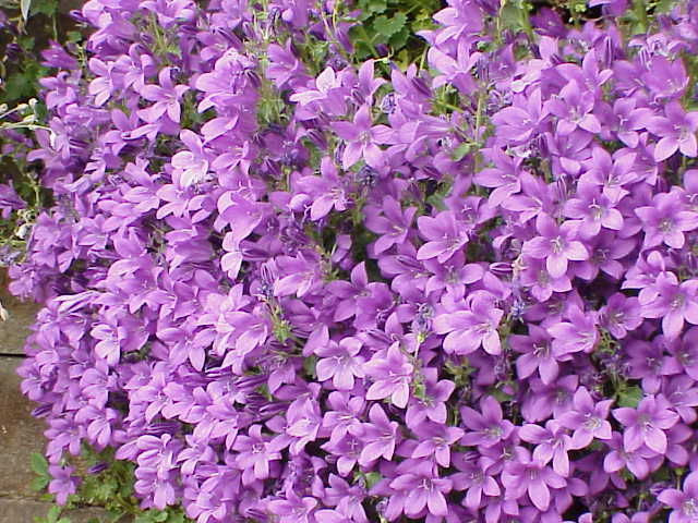 Species: Campanula portenschlagiana Family: Campanulaceae Image No. 2